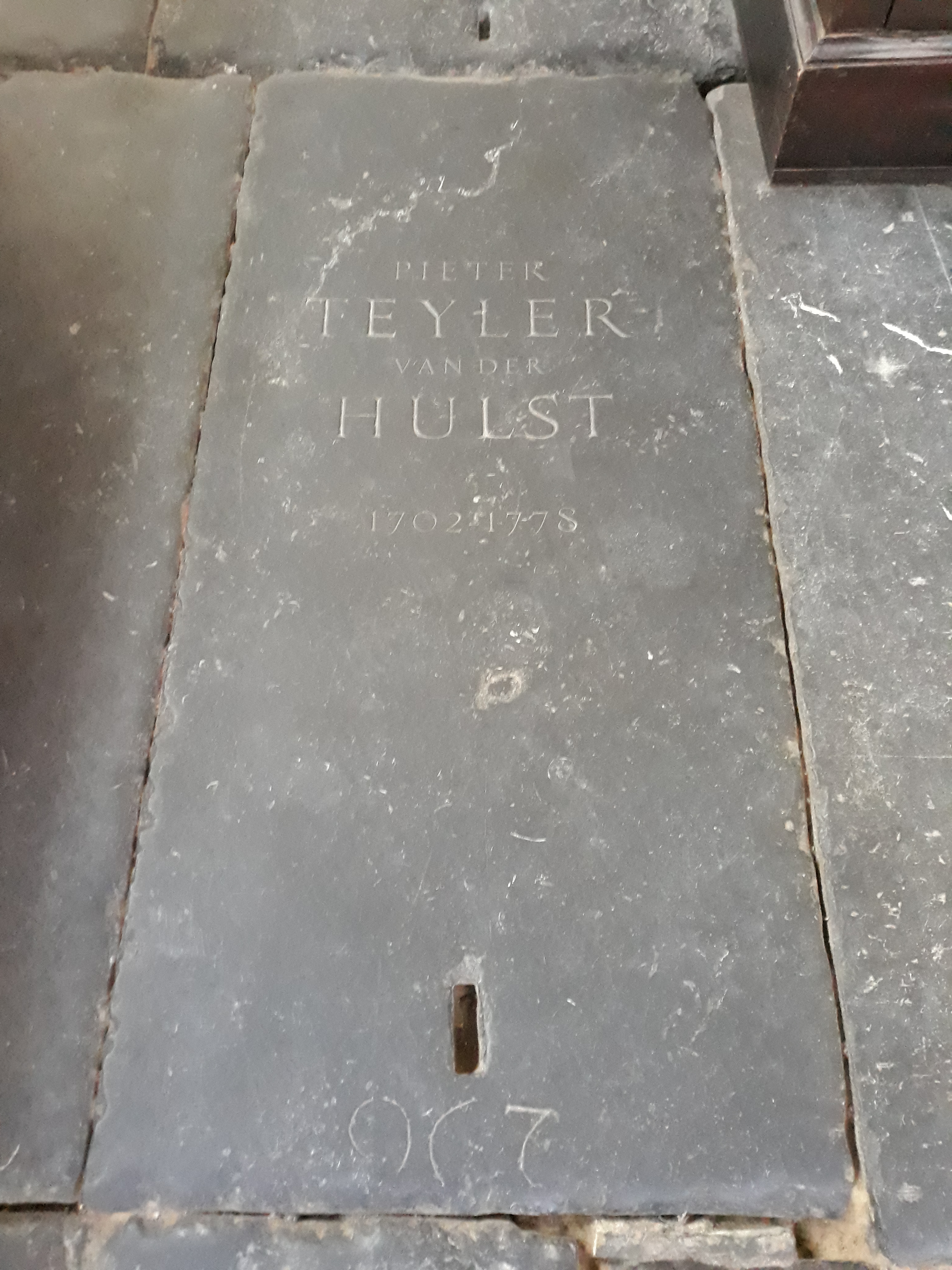 Das Grab des niederländischen Kaufmanns und Museumsgründers Pieter Teyler van der Hulst in der Bavokirche Haarlem.